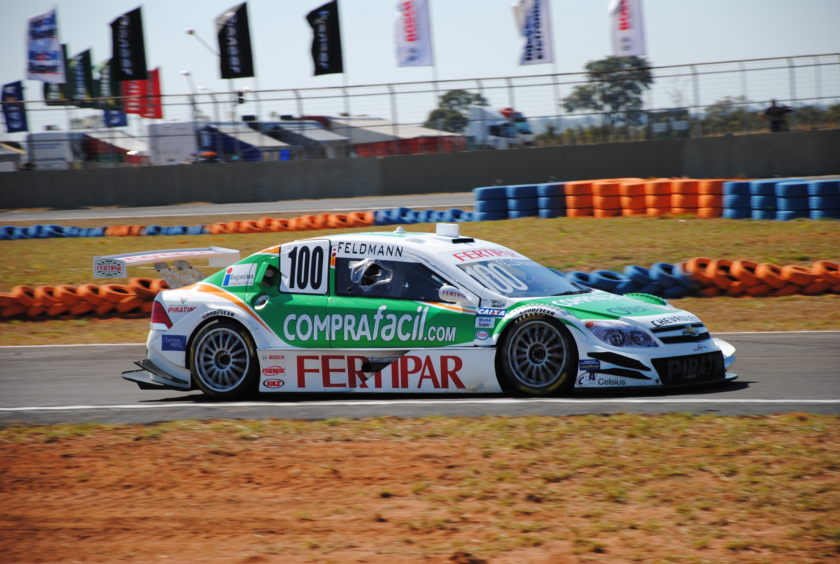 Stock Car Brasil series. Autódromo de Campo Grande, MS.